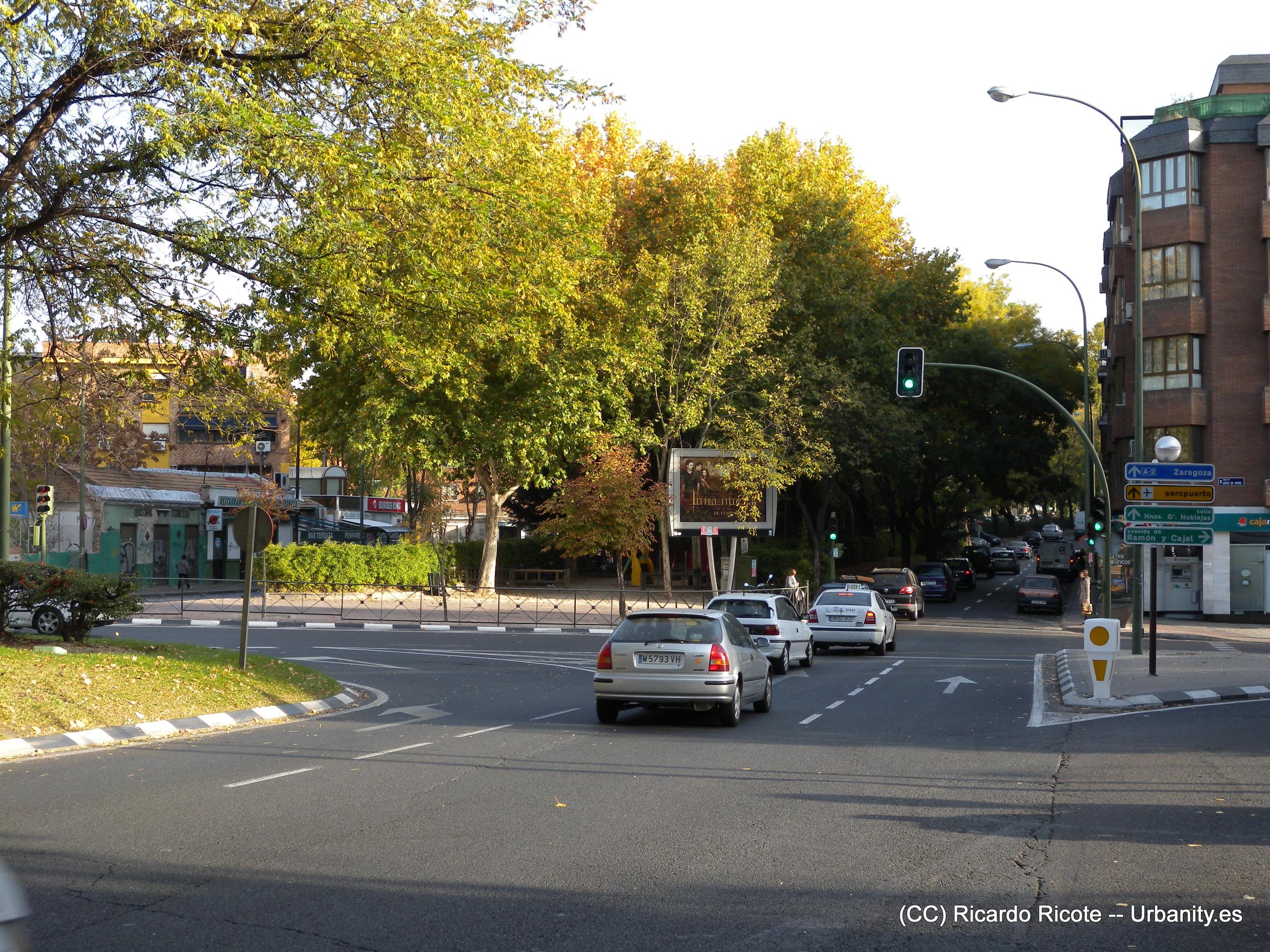 Arturo Soria